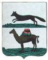 Герб Челябинска (1782)Татарча/tatarça: Чиләбе гербы (1782)